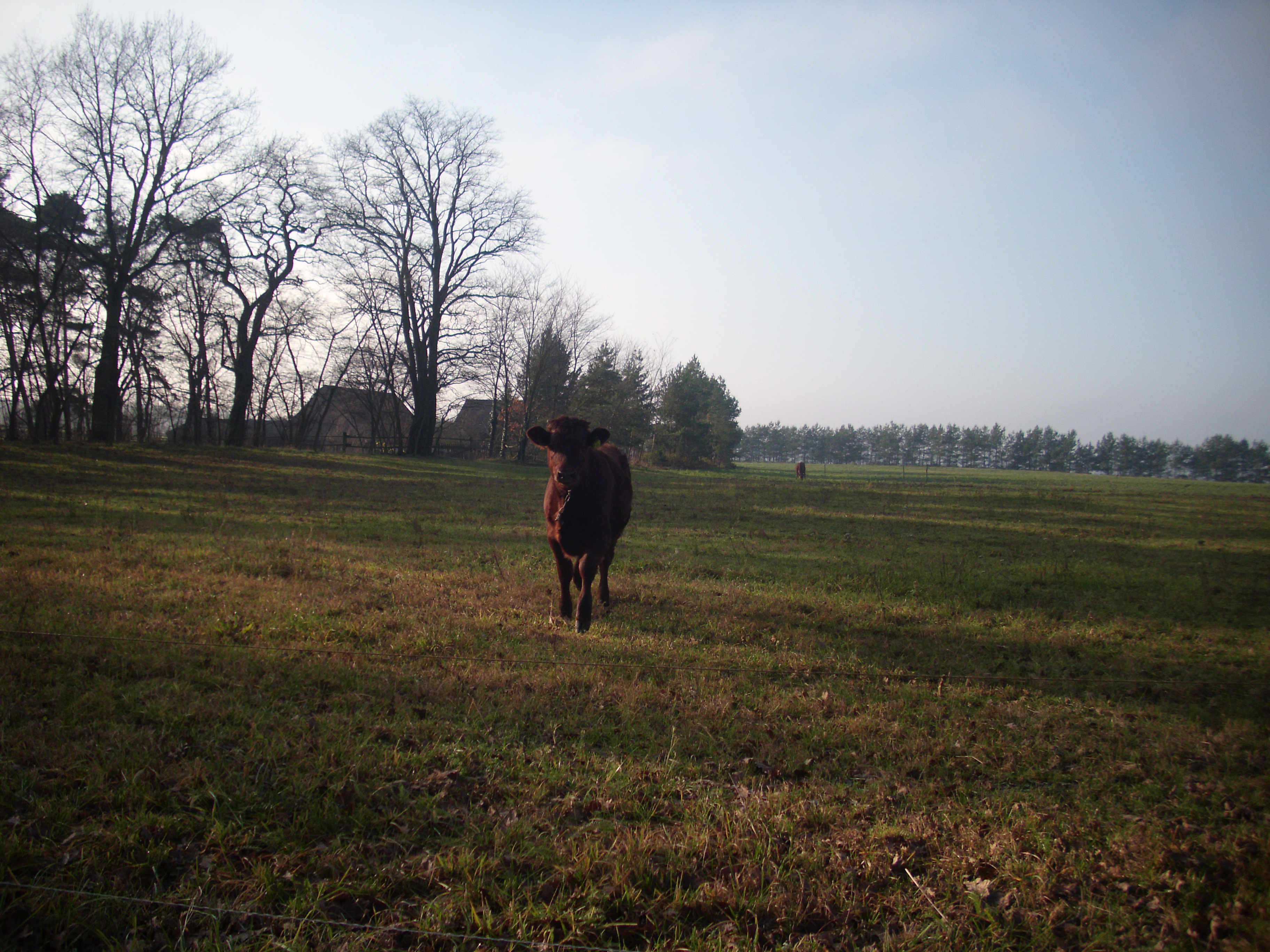 Mühlengrundstück der ehemaligen Mühle in Krügersdorf, Beeskow, Brandenburg